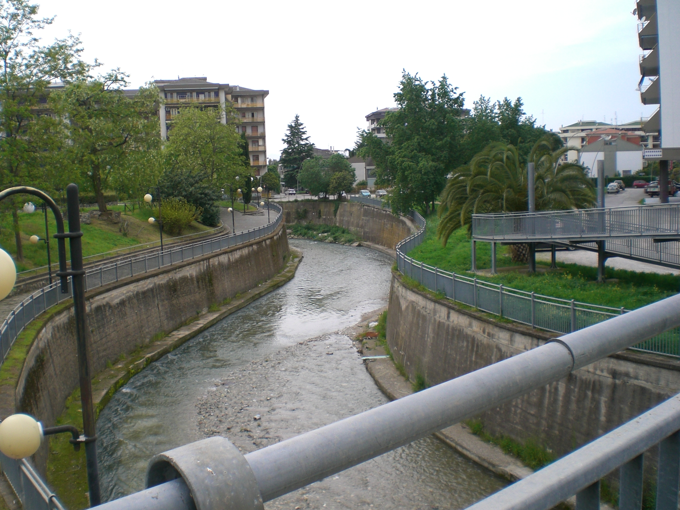 Fiume Tusciano, Battipaglia